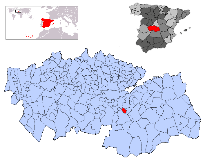 Villaminaya en la provincia de Toledo